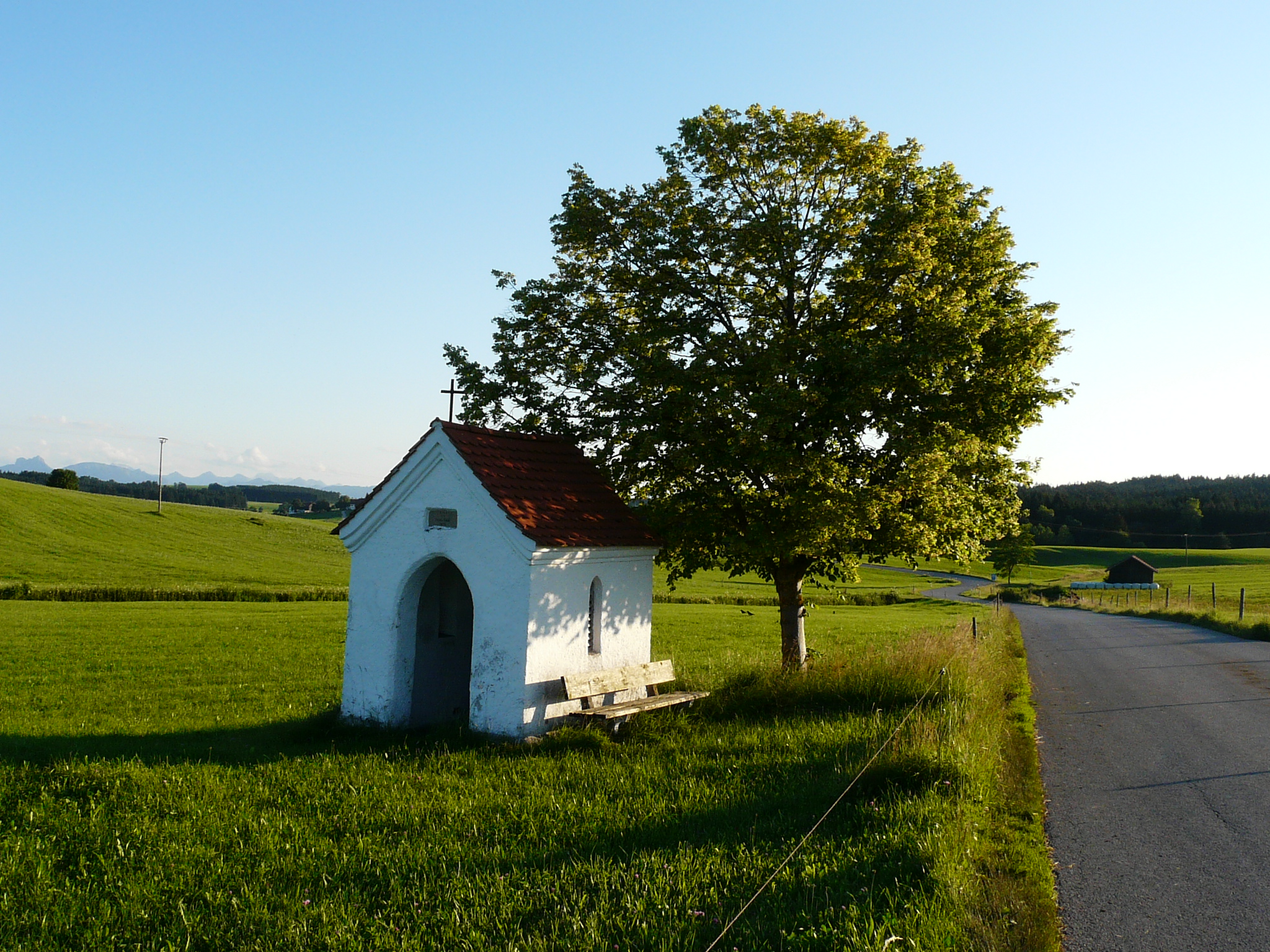 Wegkapelle bei Rettenbach am Auerberg